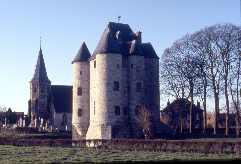 le château de Bours